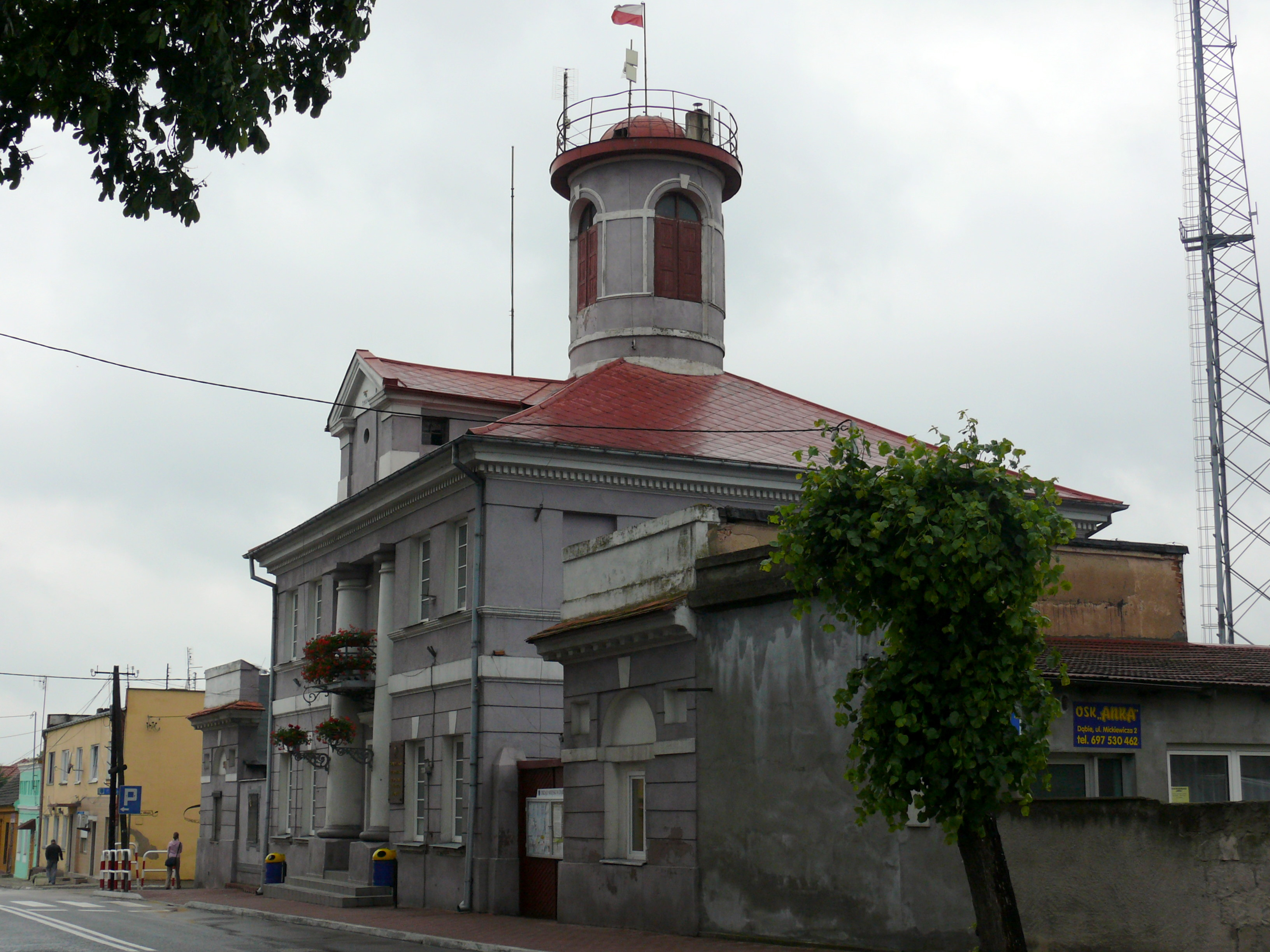 Ratusz w Dąbiu nad Nerem